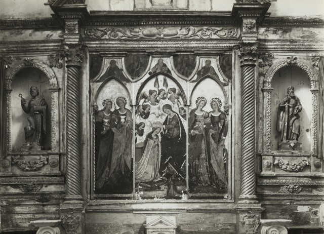 Il retablo barocco con l'Incoronazione della Madonna e santi di Giovanni da Gaeta (1456) e le statue di San Pietro (a sinistra) e San Paolo (a destra), demolito nel corso dei restauri del 1934-1937.